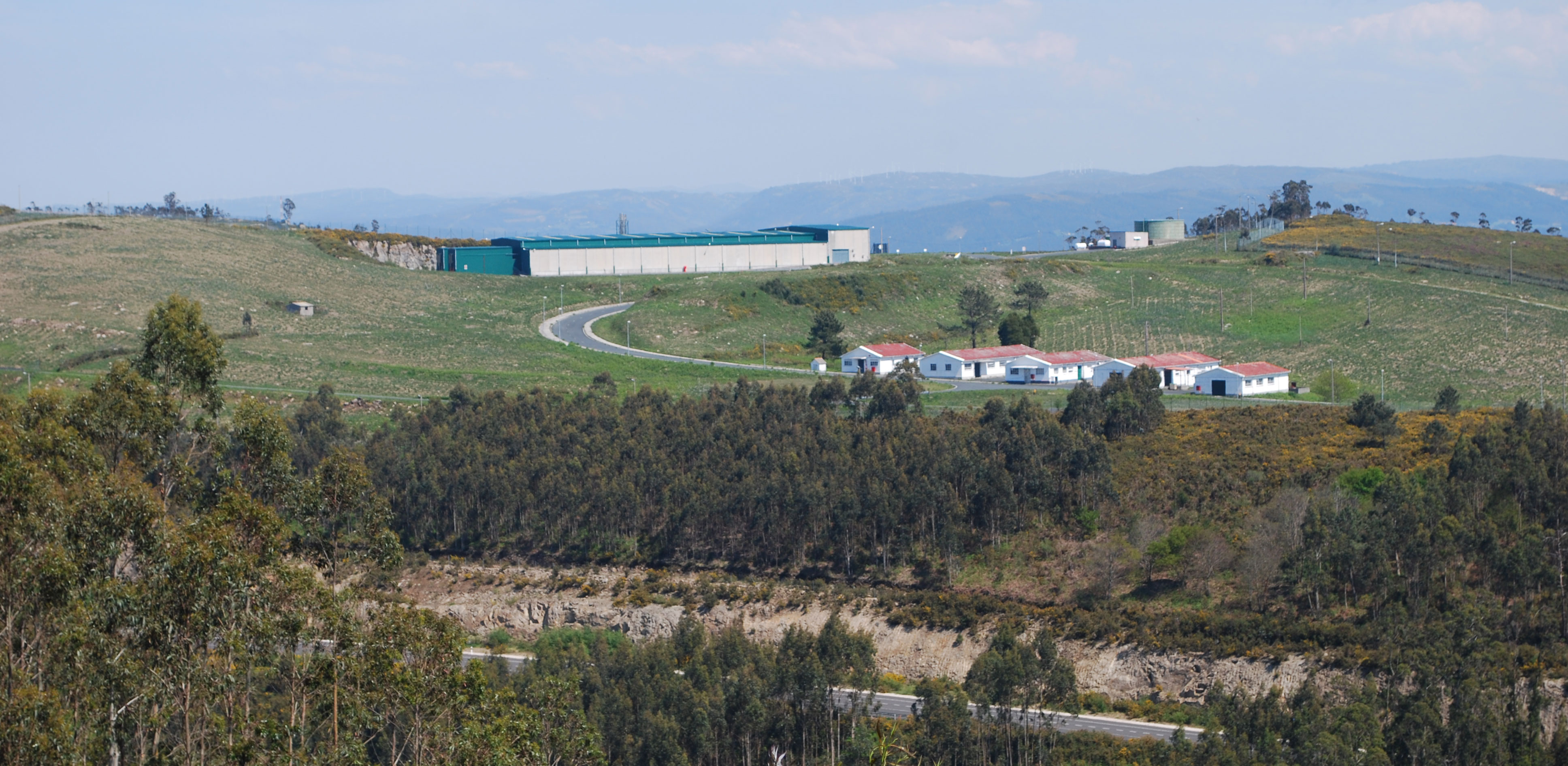 Vista do cumio do monte, instalacións da Armada Española en Mougá, Ferrol A Coruña Galiza Spain